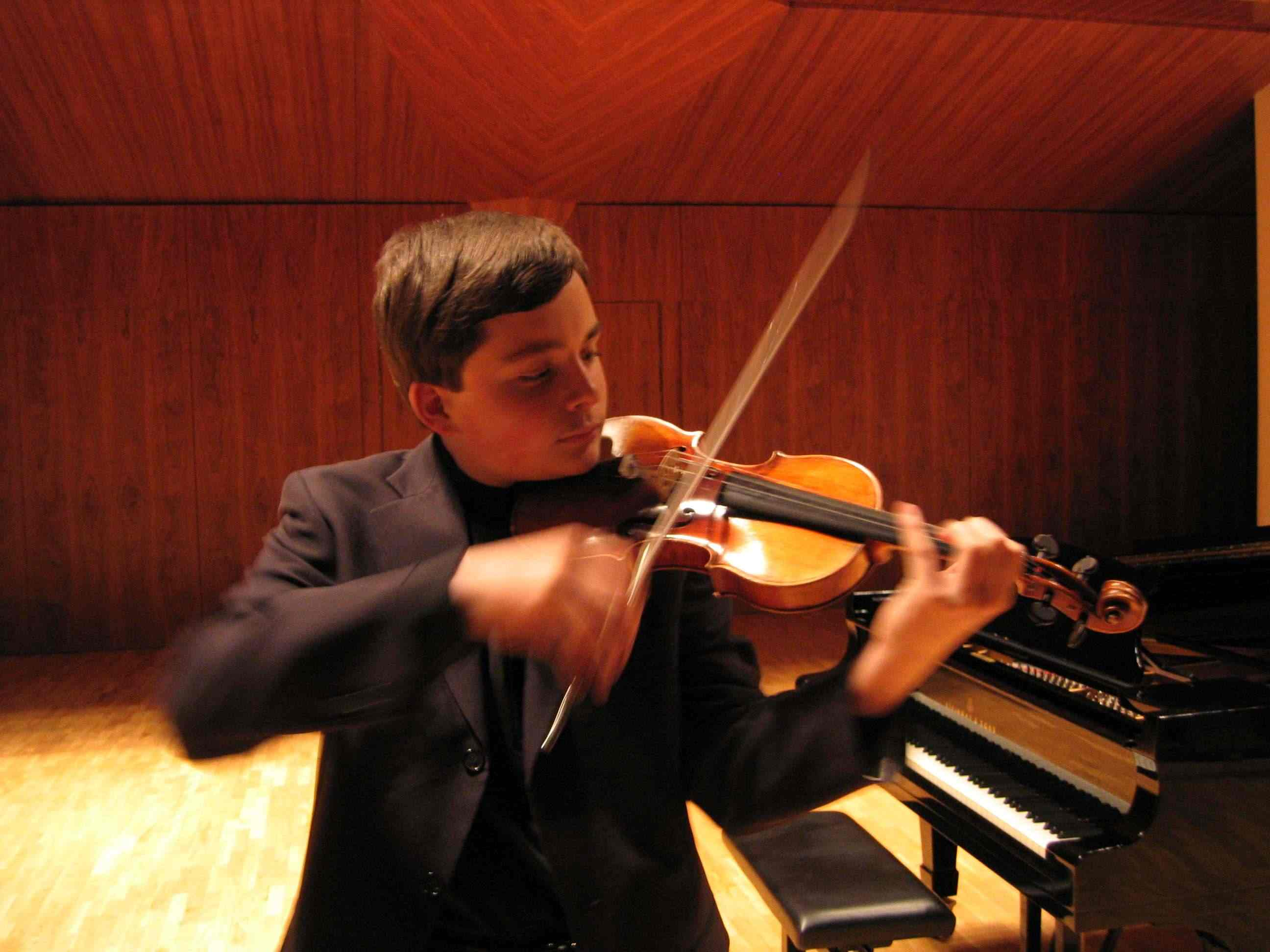 Francisco Garcia Fullana, Violinista español ganador del Premio Nacional Pablo de Sarasate